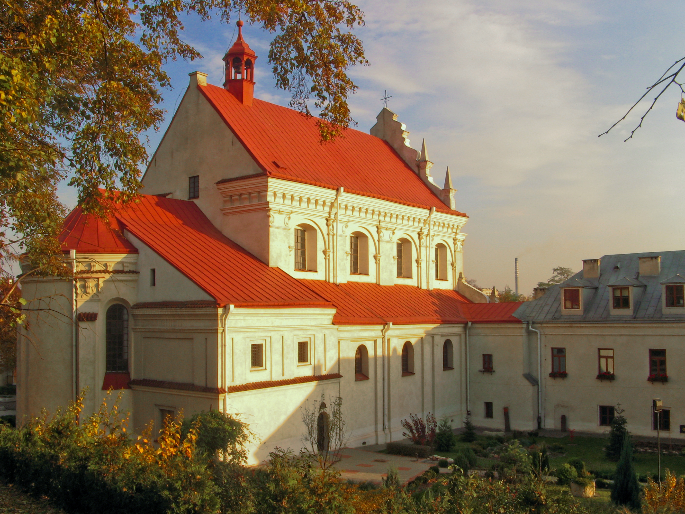 Polska, Lublin, Kalinowszczyzna, Kościół św. Agnieszki